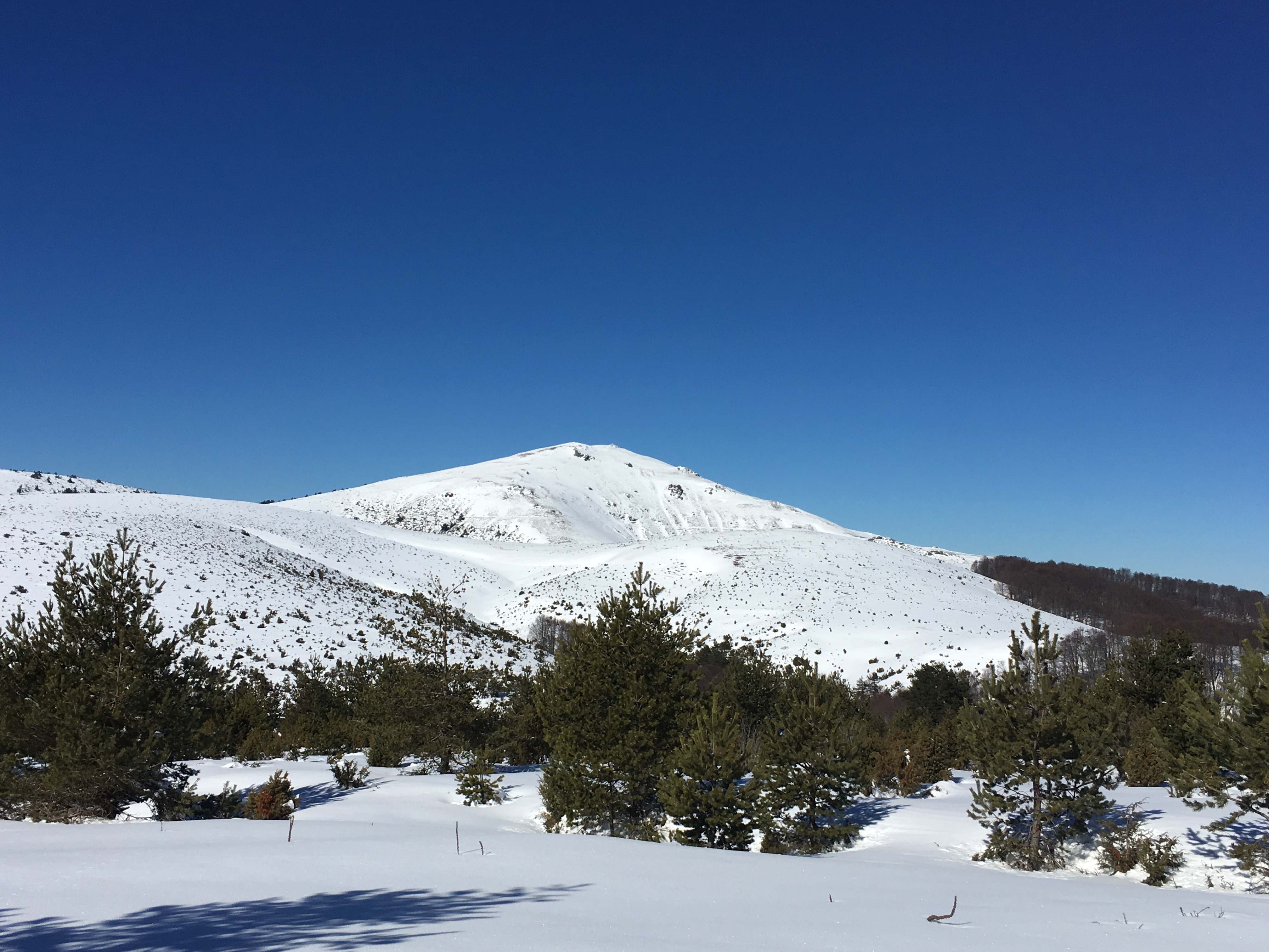 Кадиица (1.932 м) на планината Влаина